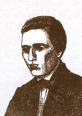 Русский философ Памфил Данилович Юркевич (1826-1874)